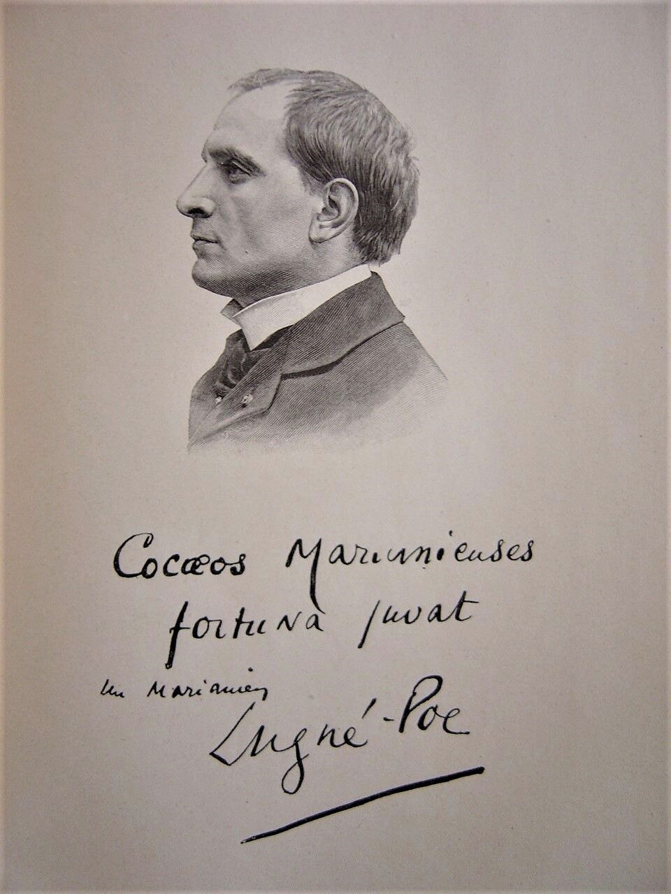 French theatre director Aurélien Lugné-Poe (1869-1940)